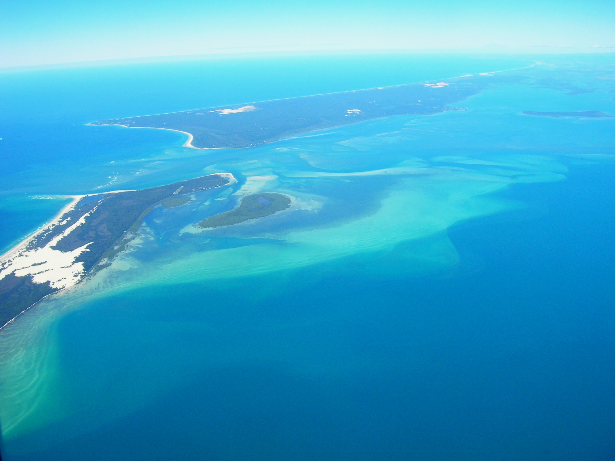 i090806 023